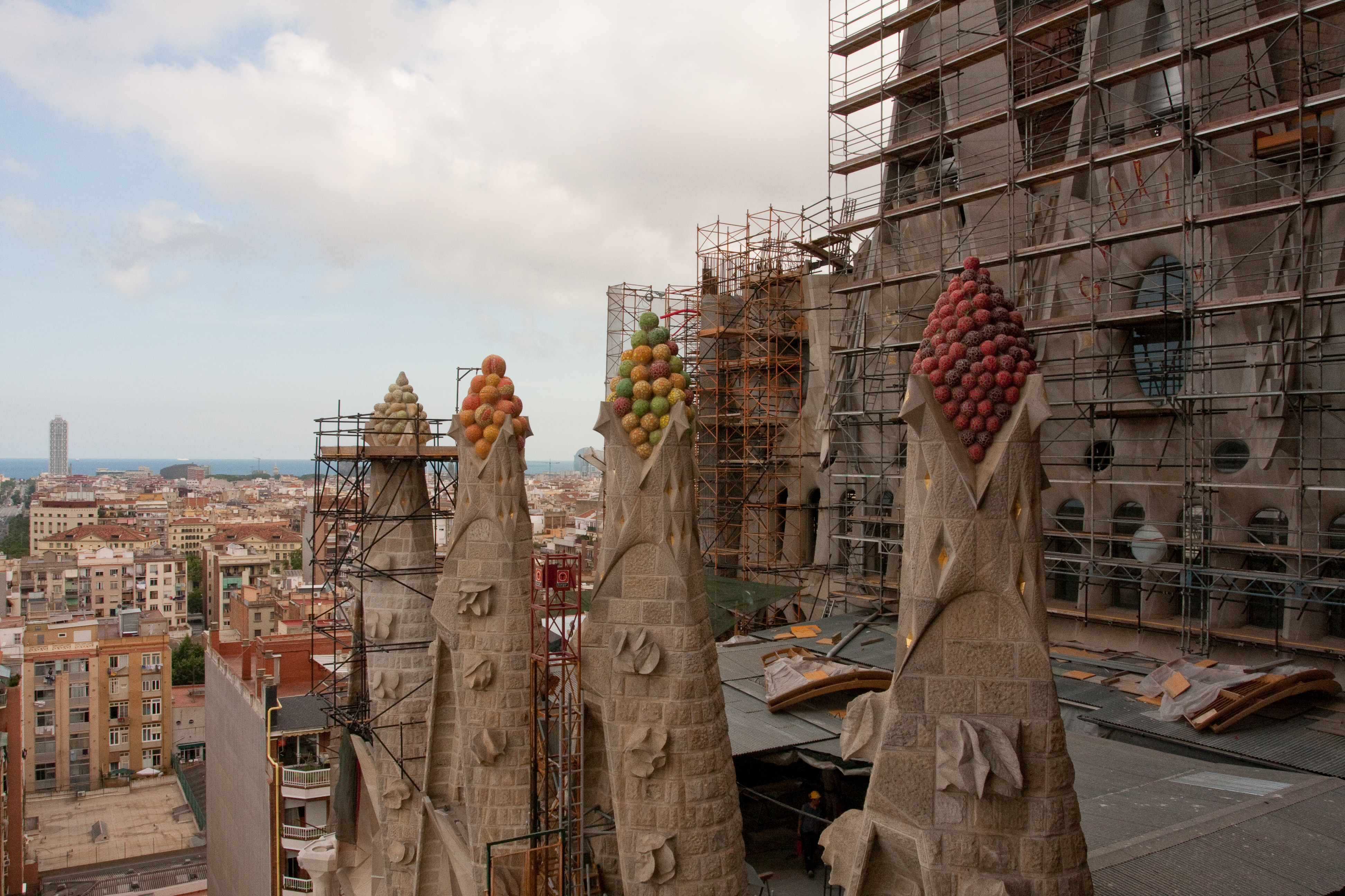 Sagrada Familia, Barcelona, Spain